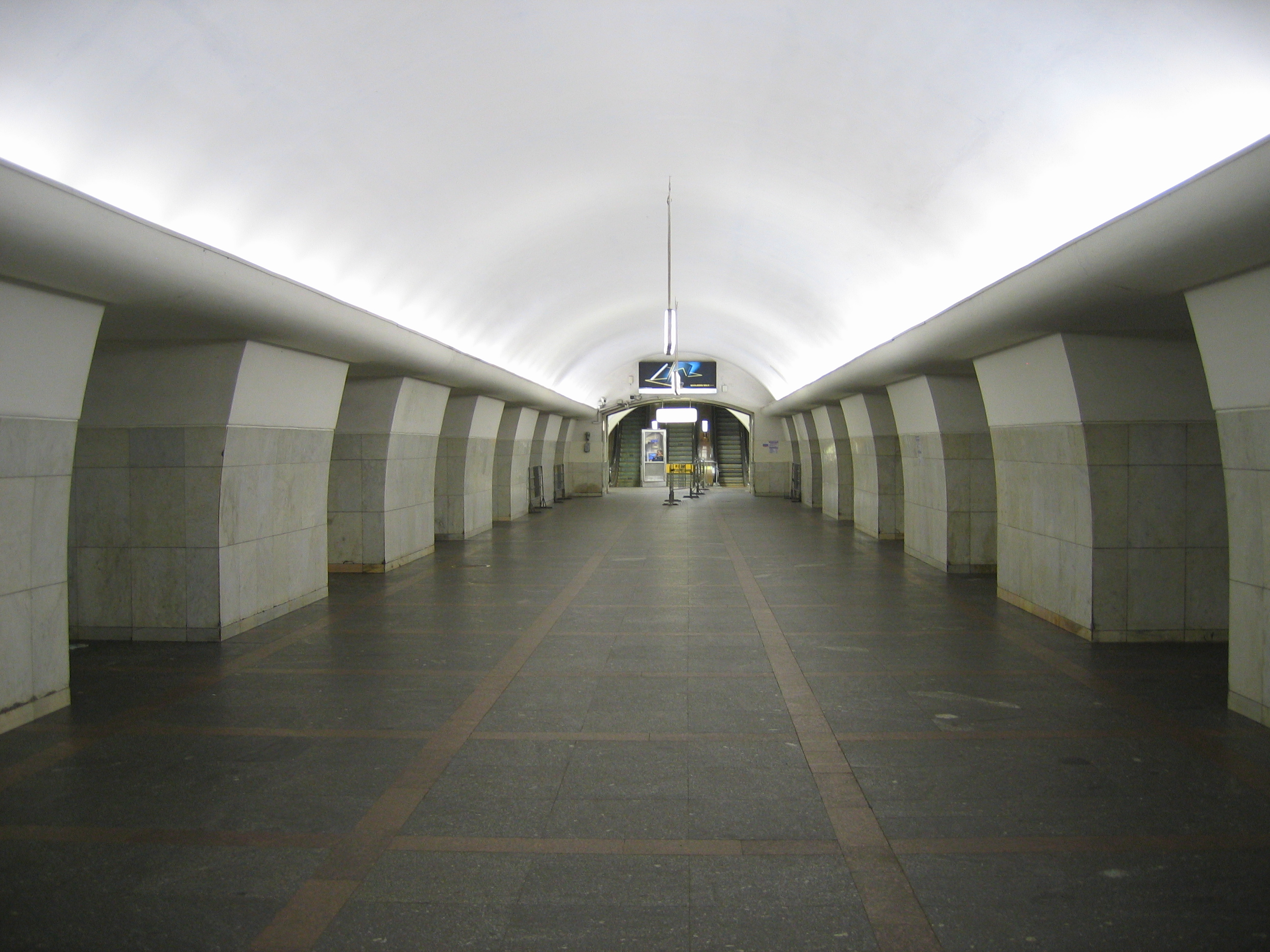 Московский метрополитен. Станция Октябрьская-радиальная